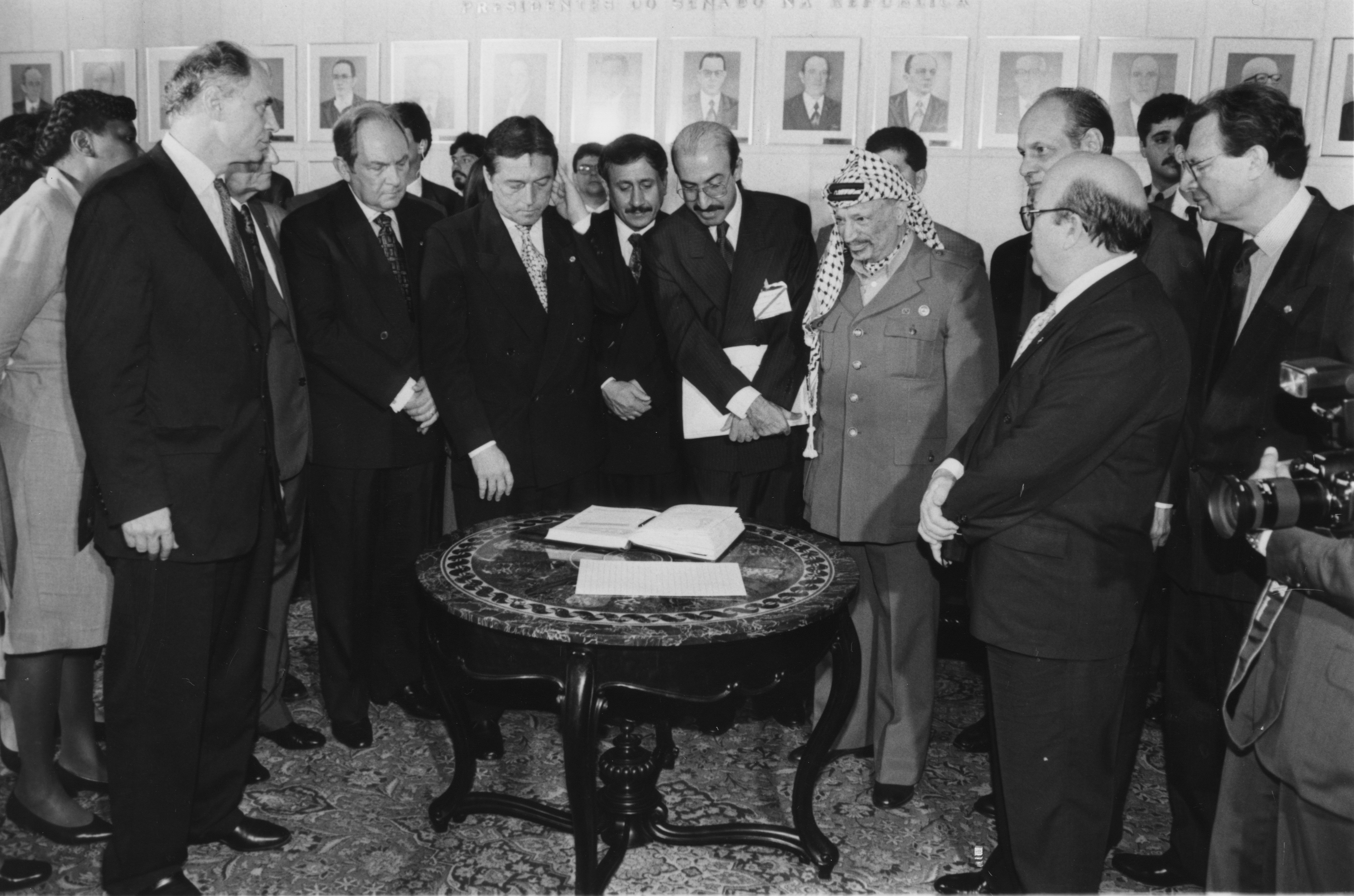 Então Presidente da Autoridade Nacional Palestina (ANP), Yasser Arafat, em visita de cortesia ao Senado Federal. Na ocasião ele foi recebido pelo 1º Vice-Presidente da Casa, Senador Teotonio Vilela Filho. Na foto, também estão os senadores Benedita da Silva (PT-RJ), Eduardo Suplicy (PT- SP), Bernardo Cabral (AM), e Ney Suassuna (PMDB-PB). Outubro de 1995 Fotógrafo: Célio Azevedo